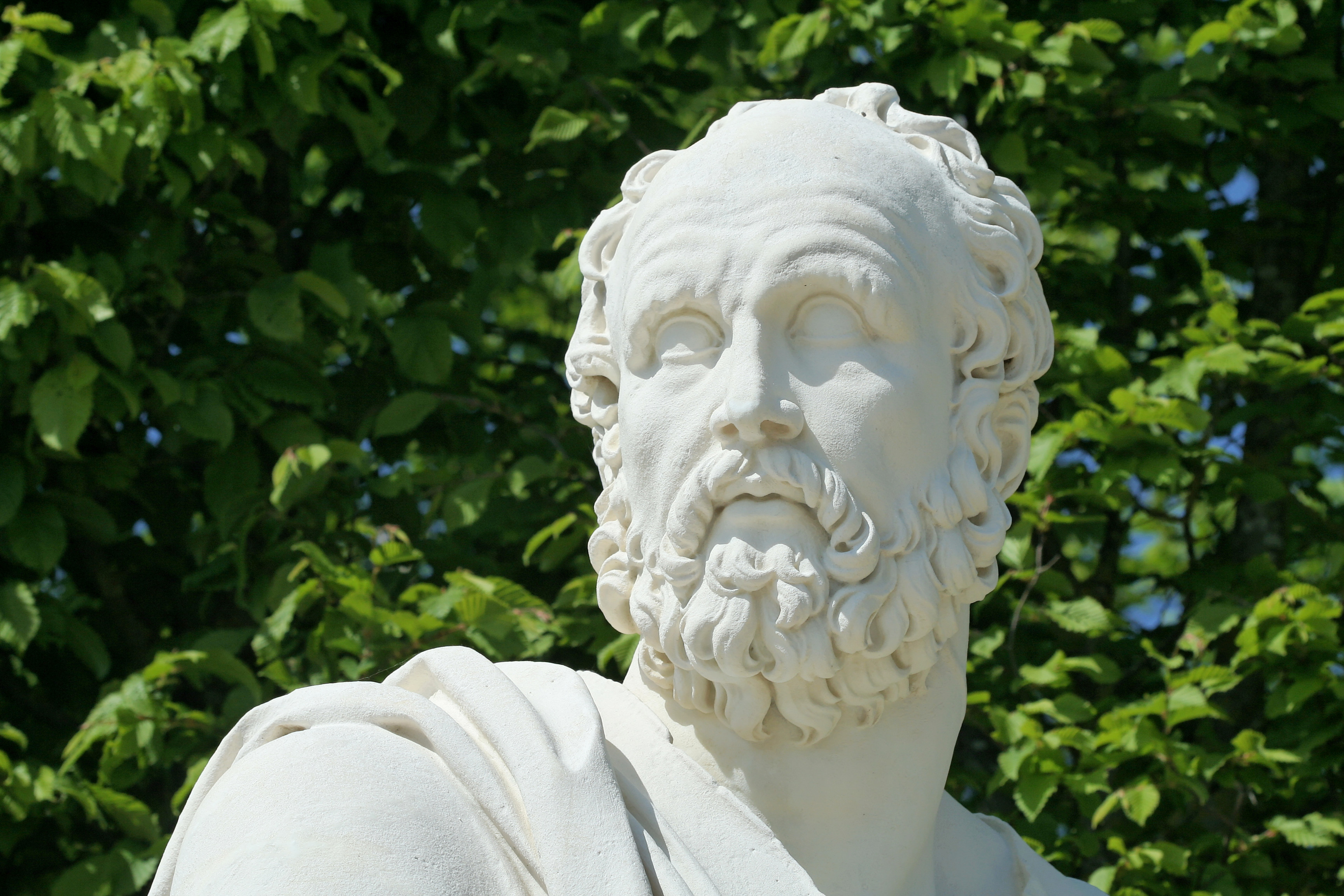 Parc de Versailles, demi-lune du parterre de Latone, Diogène par Matthieu Lespagnandelle.